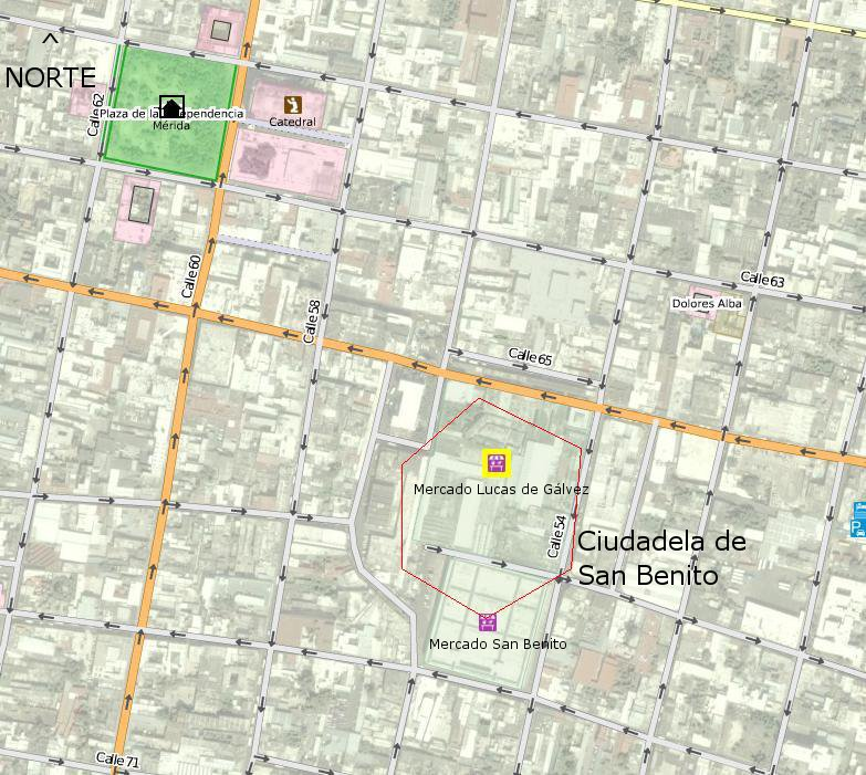 Localización aproximada de la antigua Ciudadela de SanBenito, basada en un mapa del OSM.